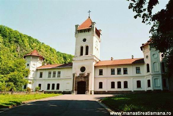 Description L'image représente le monastere Tismana de Roumanie (Moi Nicolas Tomoniu, j'ai permision du direction du monastere etand son webmeister du site )Other versions (il n'y a pas de cas)